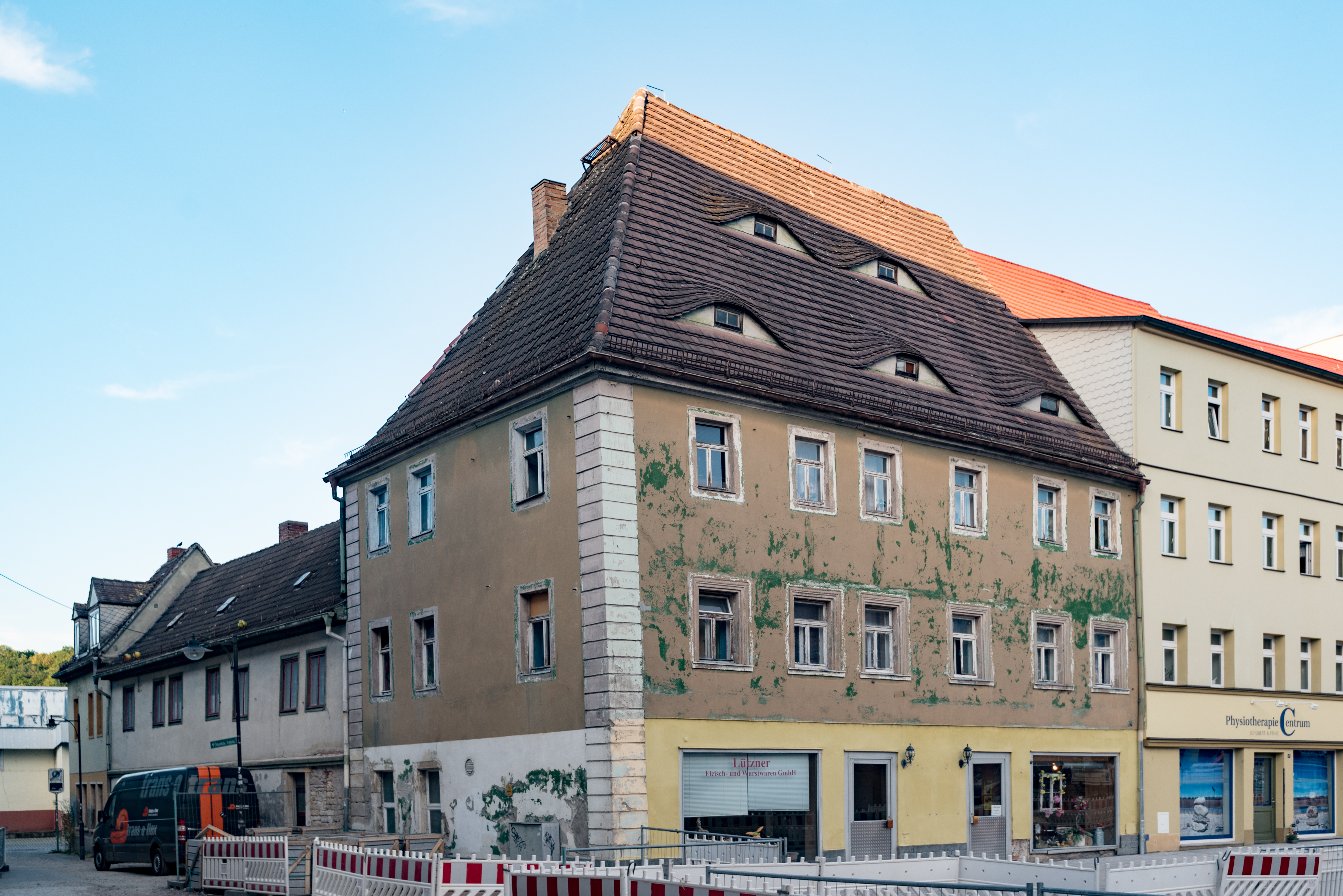 Weißenfels, Markt 17